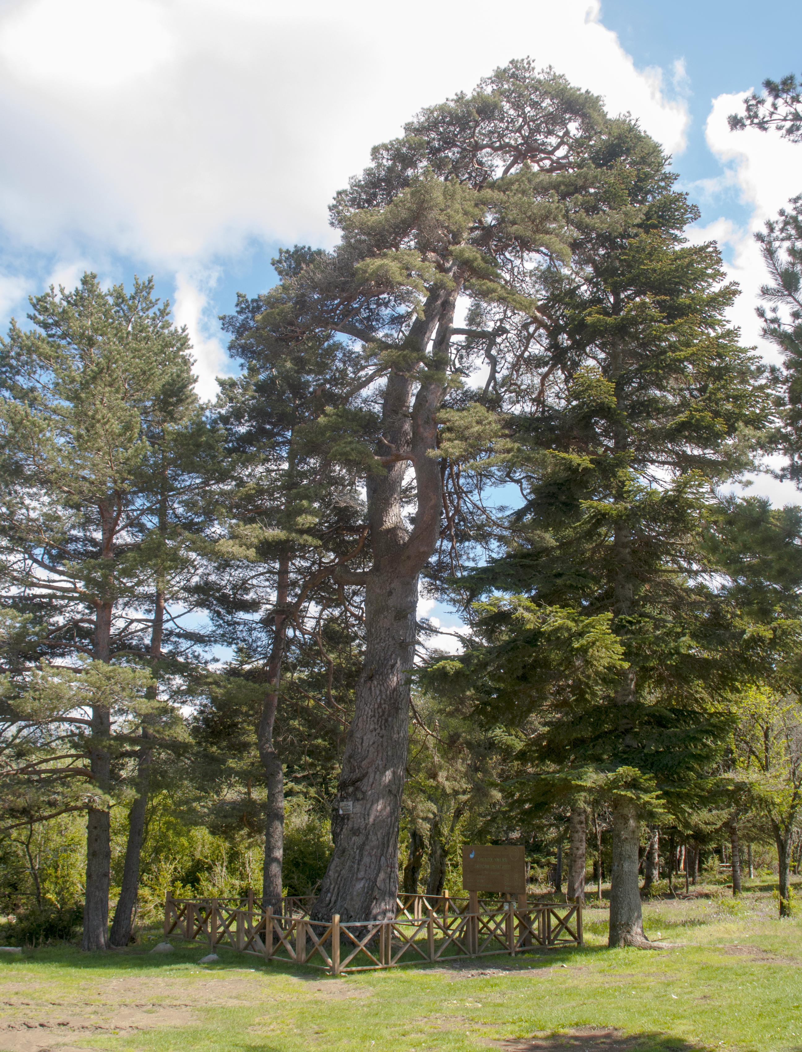 Karagöl Yaylası Sarıçam Tabiat Anıtı, Sakarya, Taraklı. 200 yaşında, 17 m uzunlukta, 1,5 m çap, 4,5 m çevreye sahiptir.